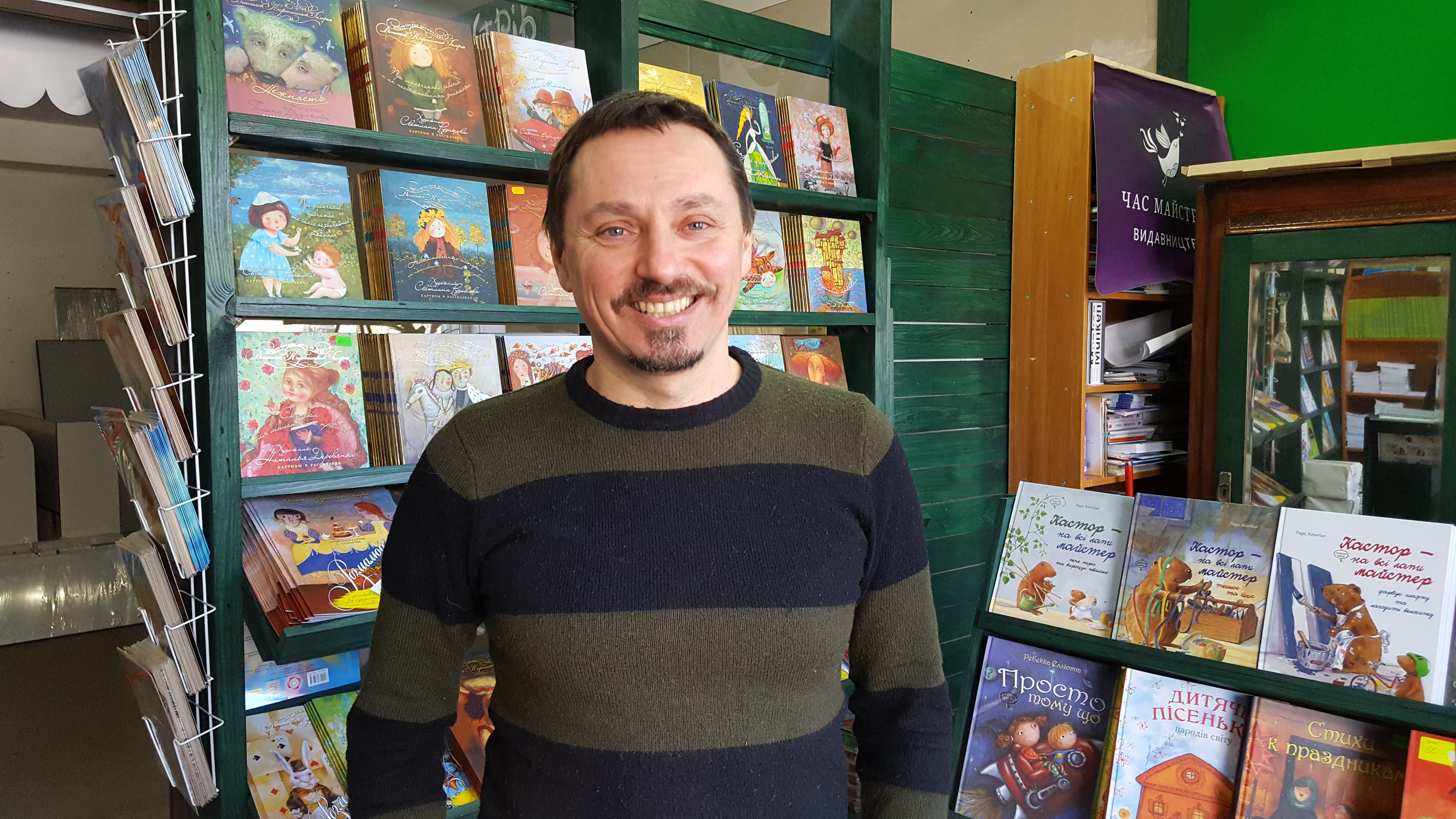 Запрошуємо до фірмового шоу-руму Видавництва!